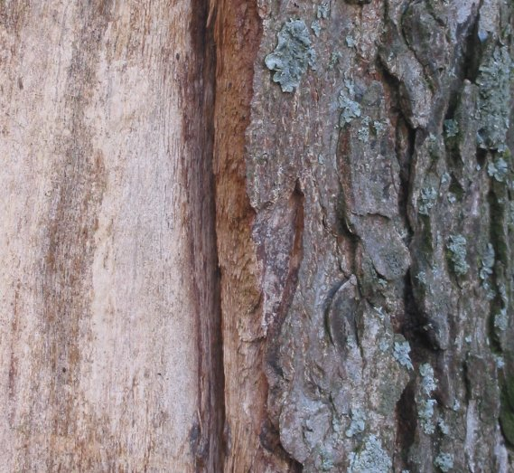 zelfgemaakte foto van afstervende bast van witte paardekastanje; half november